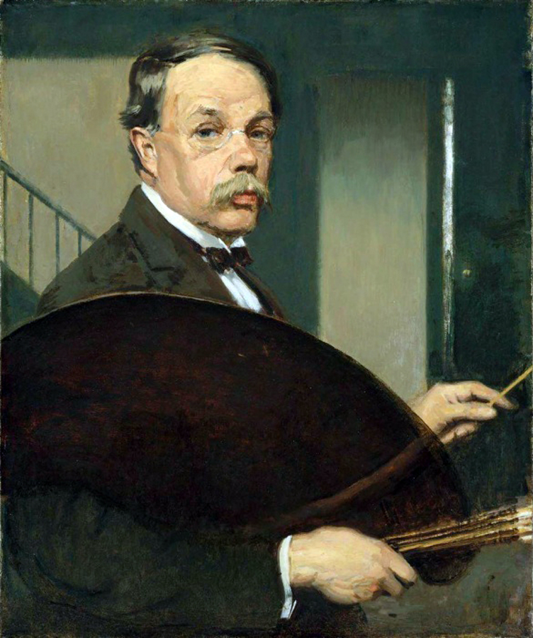 Self-portrait